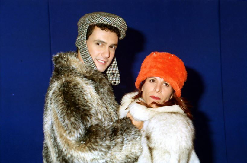 עודד מנשה ואורנה בנאי מהתכנית "קיץ על החוף"